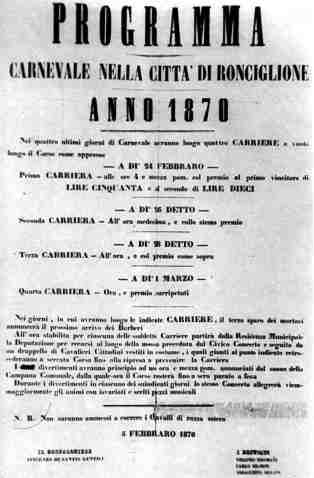 Programma del carnevale di Ronciglione, anno 1870. Nelle note è scritto "Non sonno ammessi cavalli di razza estera"